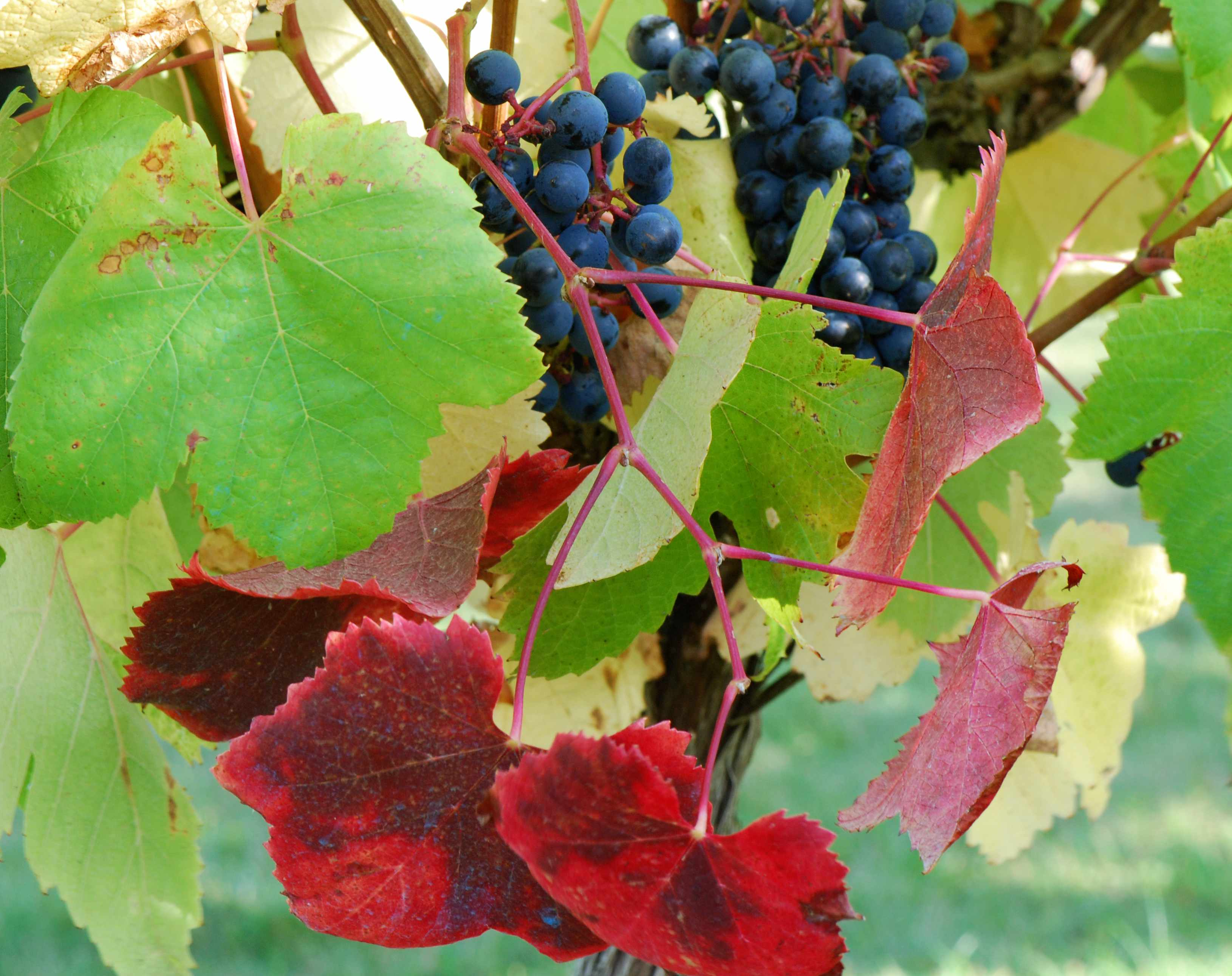 Tannat, conservatoire du vignoble charentais, Cherves 17